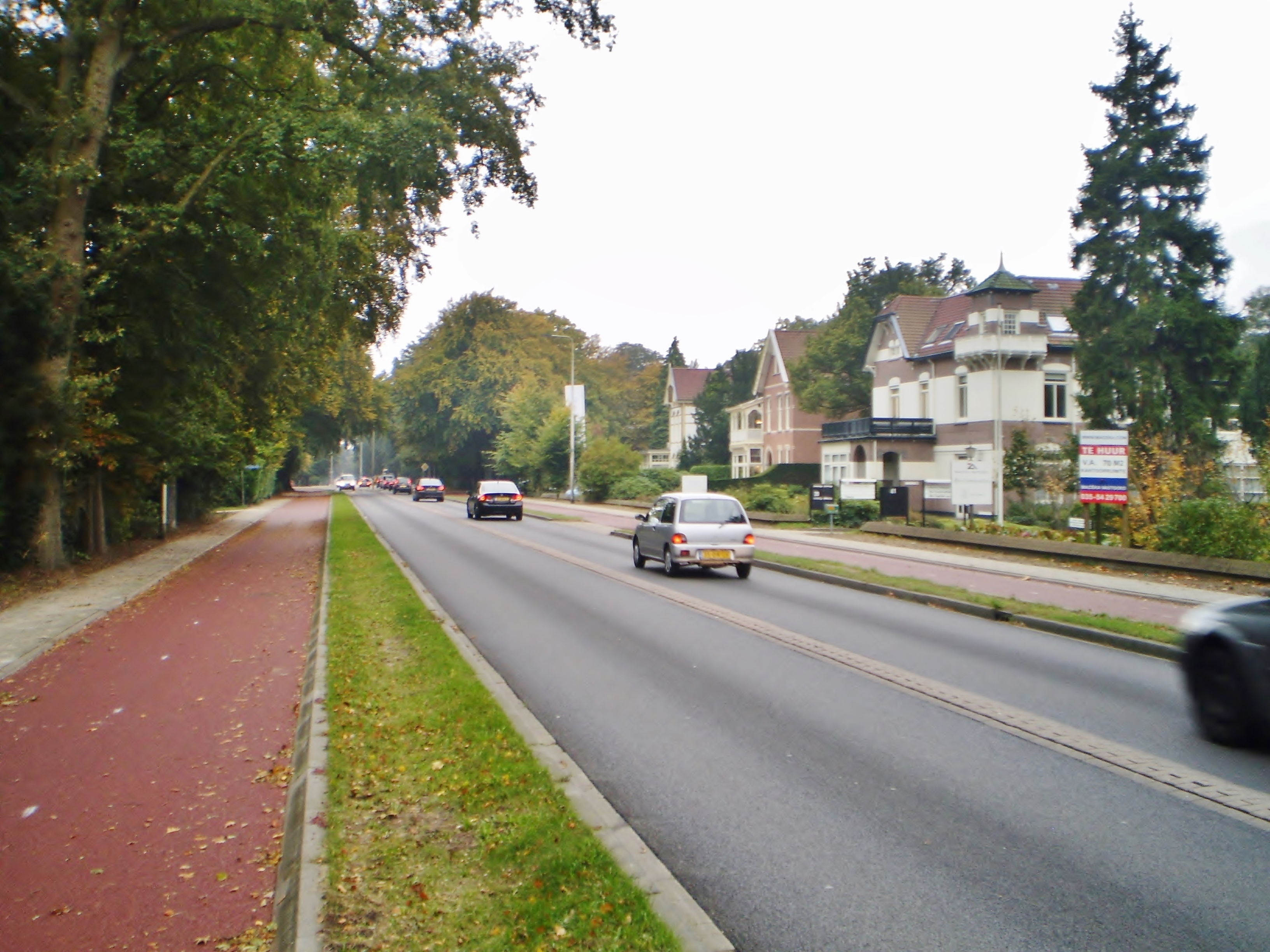 In de richting van Soest